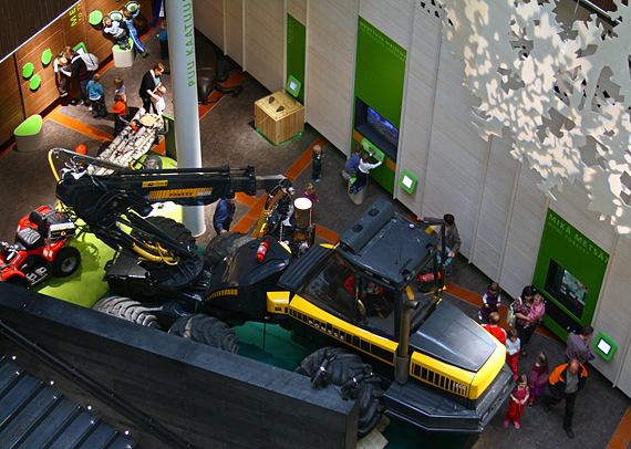 Tiedekeskus Pilke näyttely